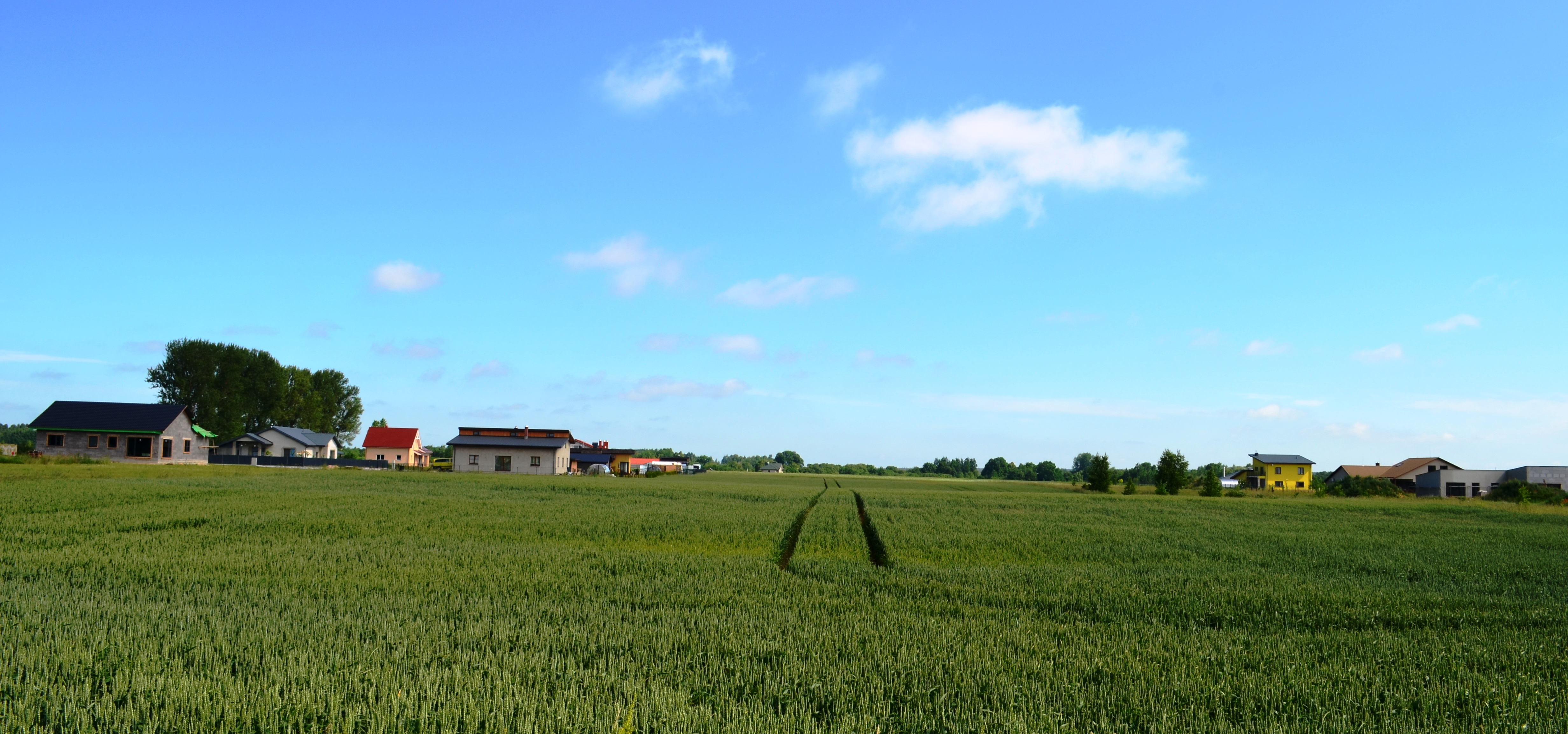 Žvyryno gatvė, Janušava (kaimas), Kėdainių raj.